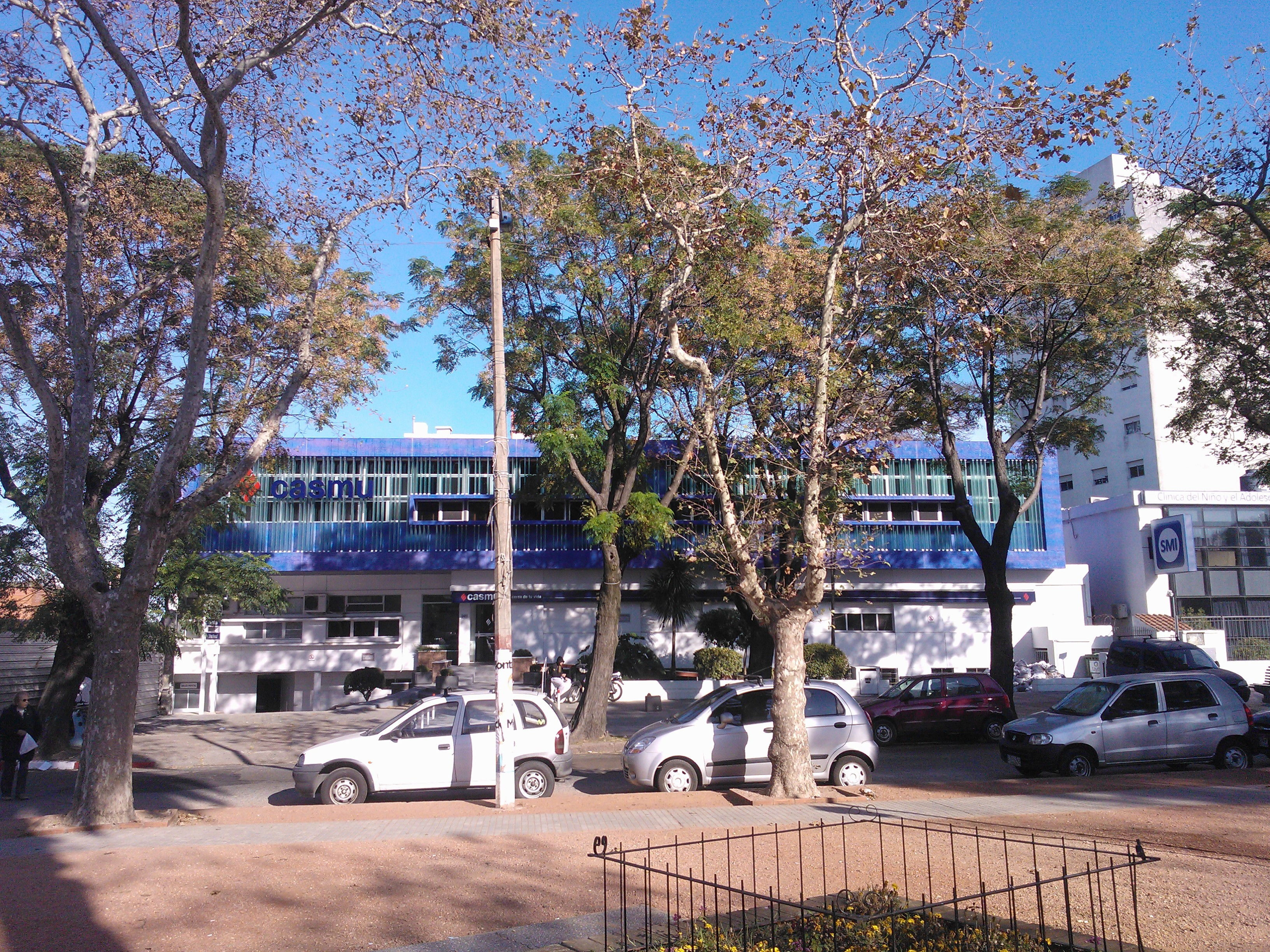 Edificio del antiguo CTI del CASMU, o "CASMU 4", hoy "Anexo Policlínico"